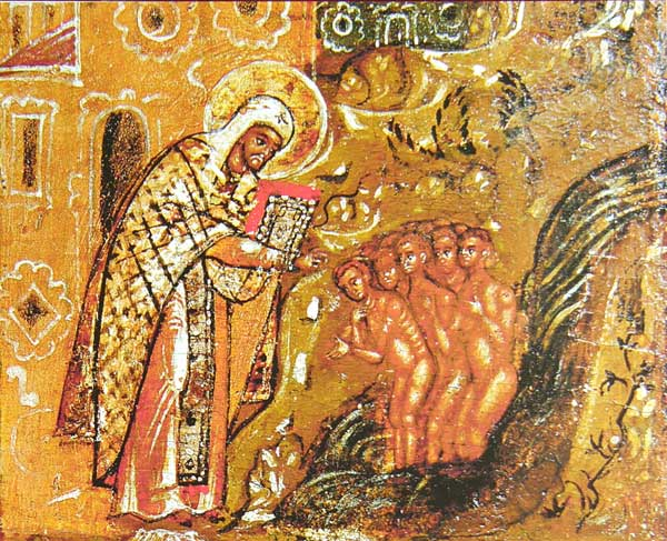 Св. Леонтий крестит детей. Клеймо иконы «Леонтий Ростовский с житием в 24 клеймах». Ок. 1677 г. 100×78 см. Муромский историко-художественный музей, Муром, Россия. Инв. М-6674.